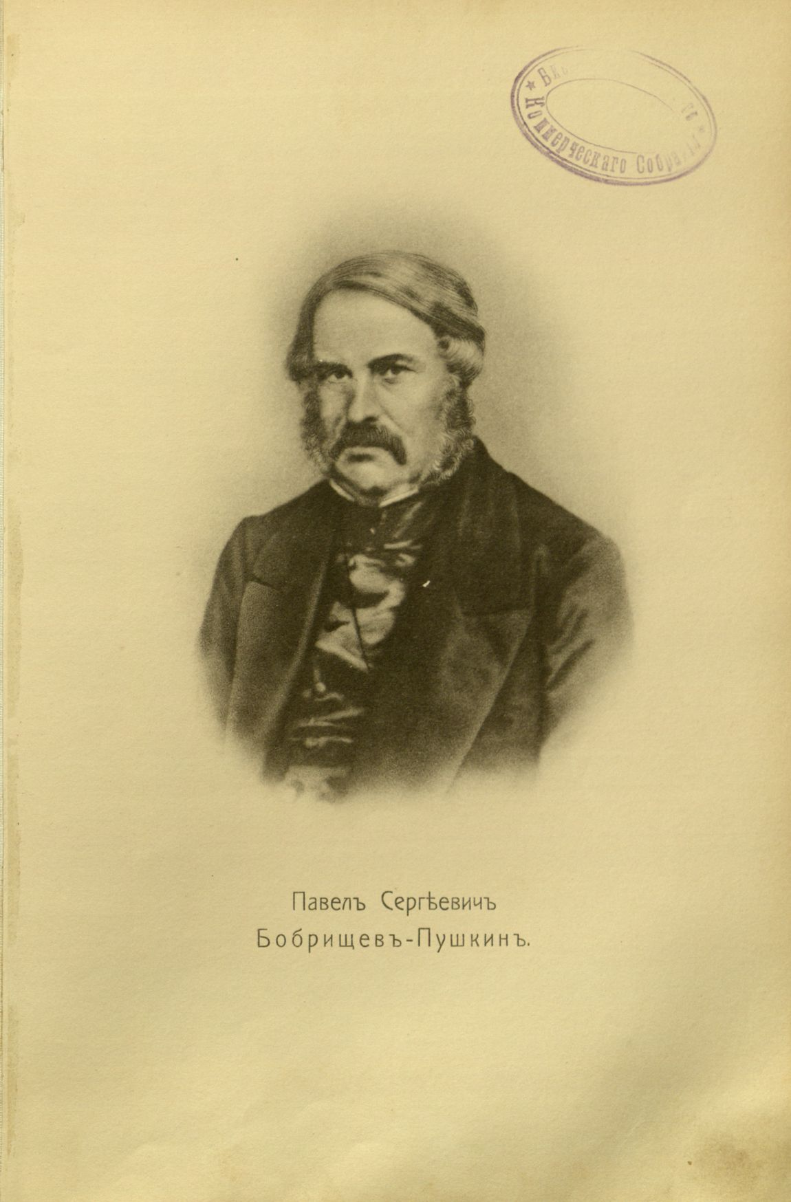 Головачев, П. М. Декабристы : 86 портретов, вид Петровского завода и 2 бытовых рисунка того времени. - М., [1906] Pavel Sergeevich Bobrischev-Pushkin